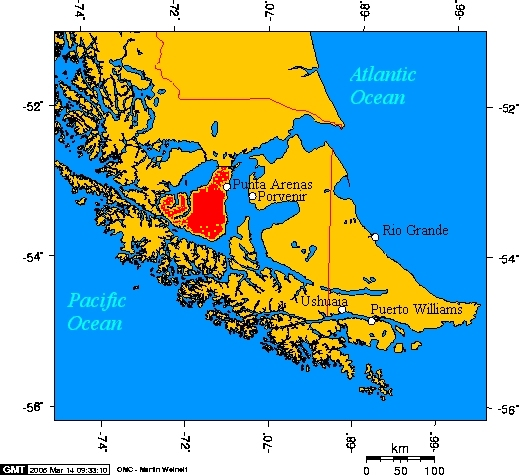 Brunswick Peninsula